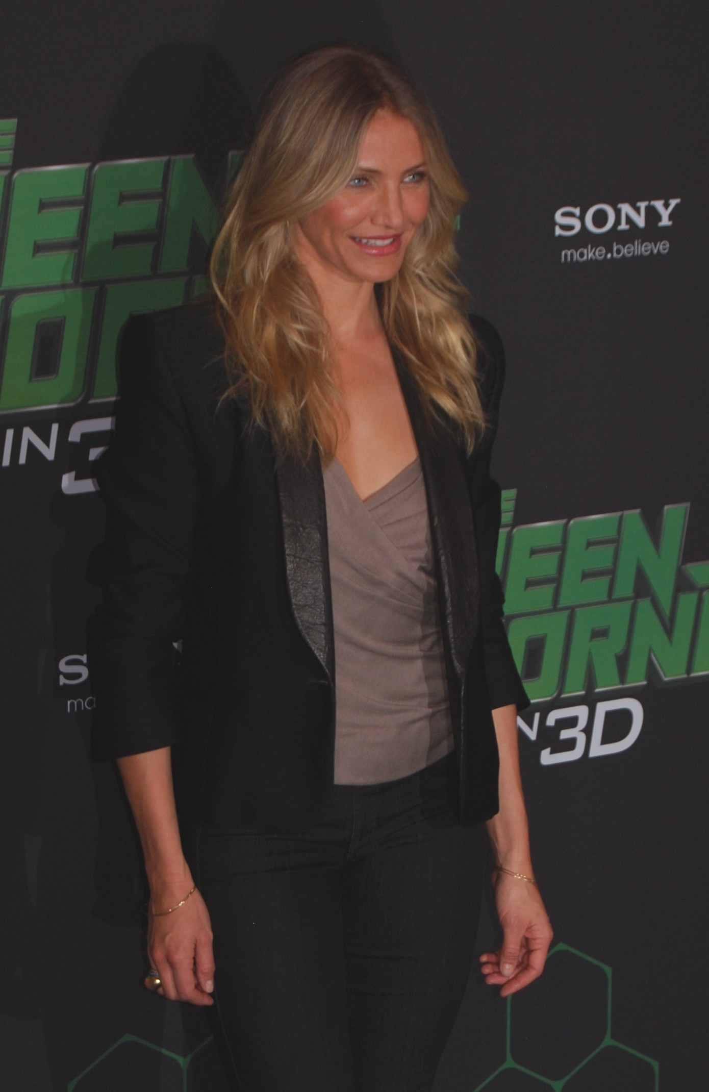 Cameron Diaz auf der Premiere von The Green Hornet im Dezember 2010 in Berlin